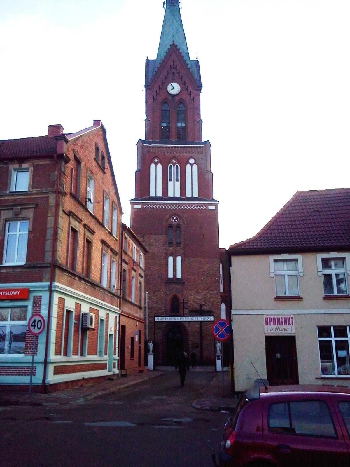 Rynek w Resku